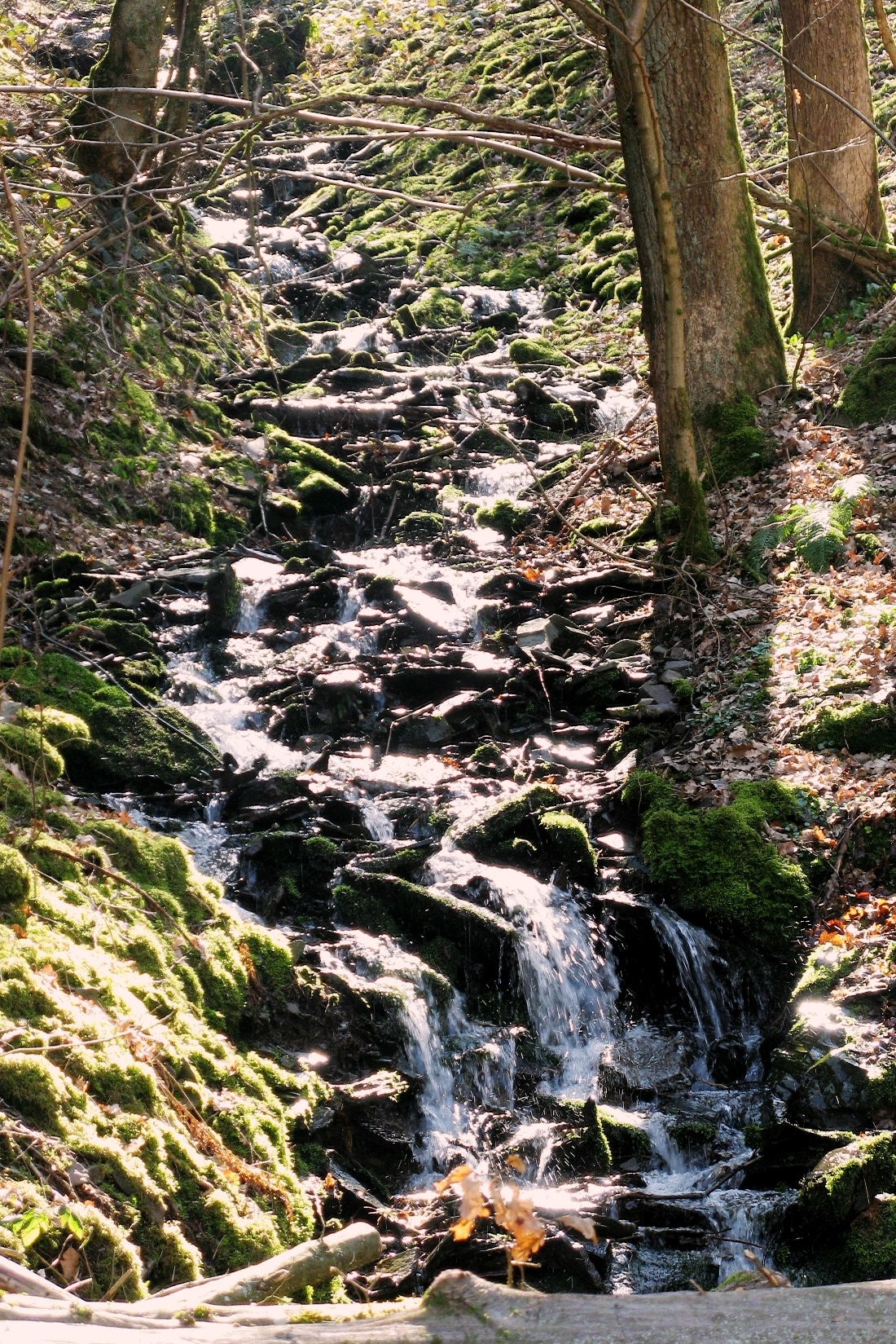 D'Dideschbaach ass eng kleng Lëtzebuerger Baach am Éislek an der Gemeng Buerschent.